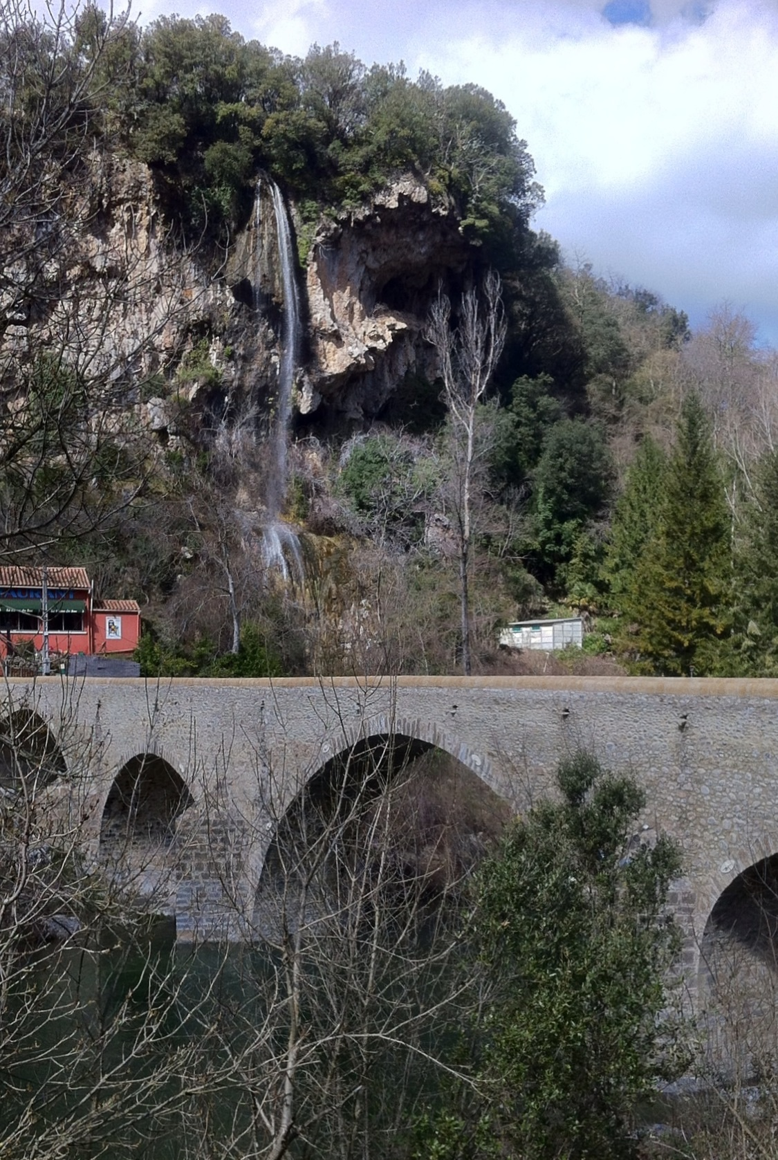 Cascade d'Aigues Folles à St Julien de la Nef